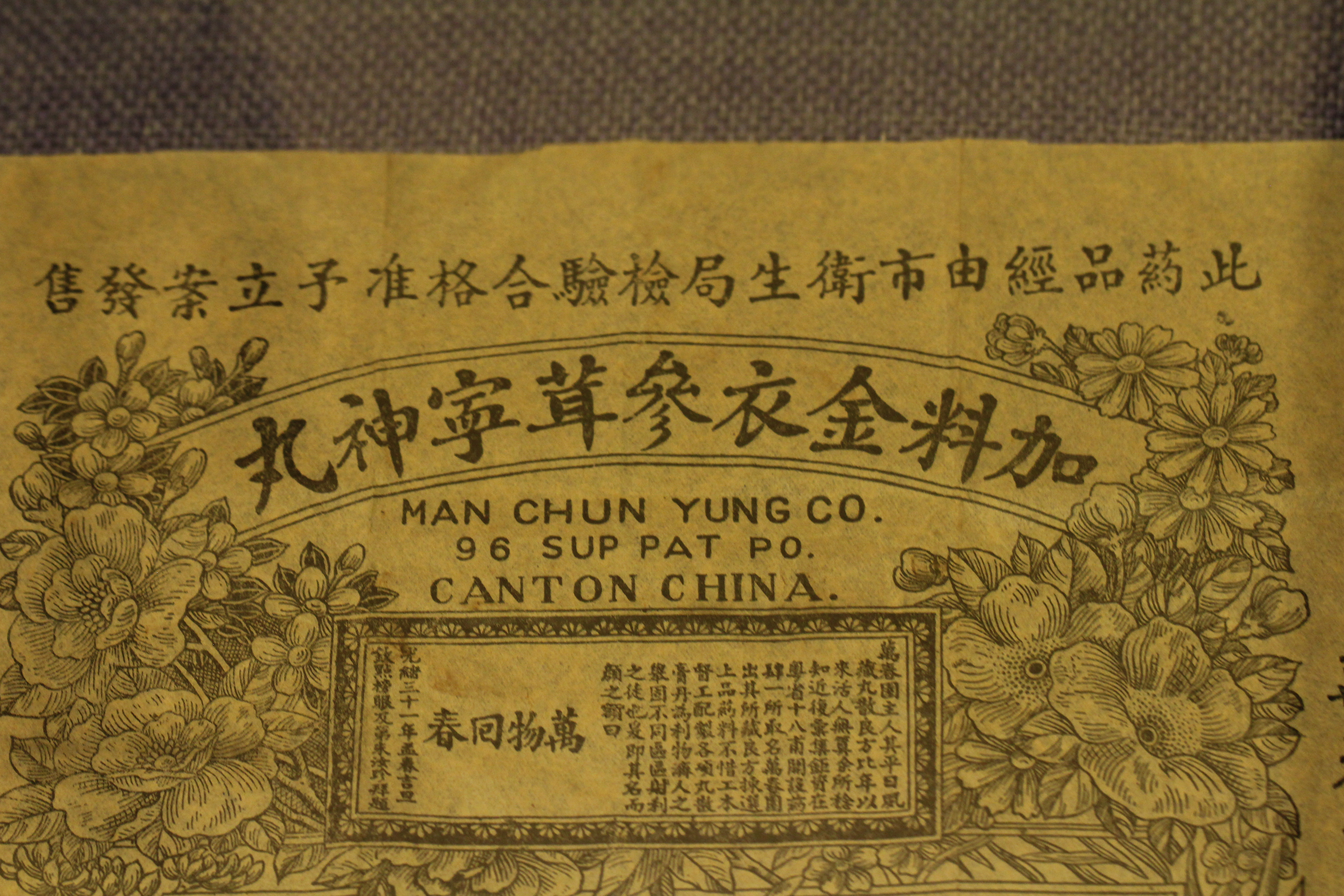 中華民國九年，廣州藥行萬春園的海報，英文以粵音拼寫「Man Chun Yung」，地址十八甫「Sup Pat Po」。